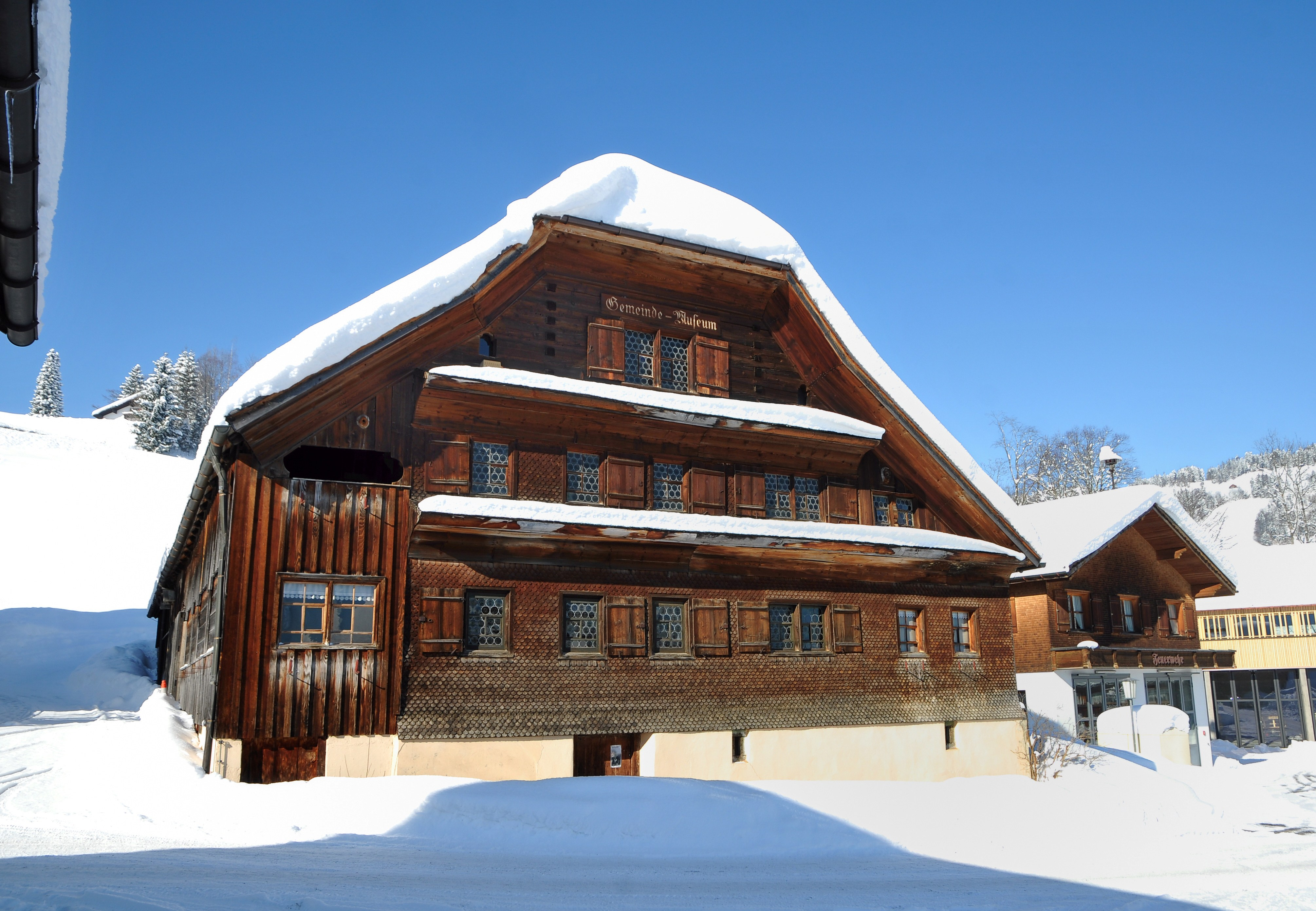 Angelika Kauffmann-Museum in Brand Nr.:34 in Schwarzenberg im Bregenzerwald. Das Haus steht unter Denkmalschutz.